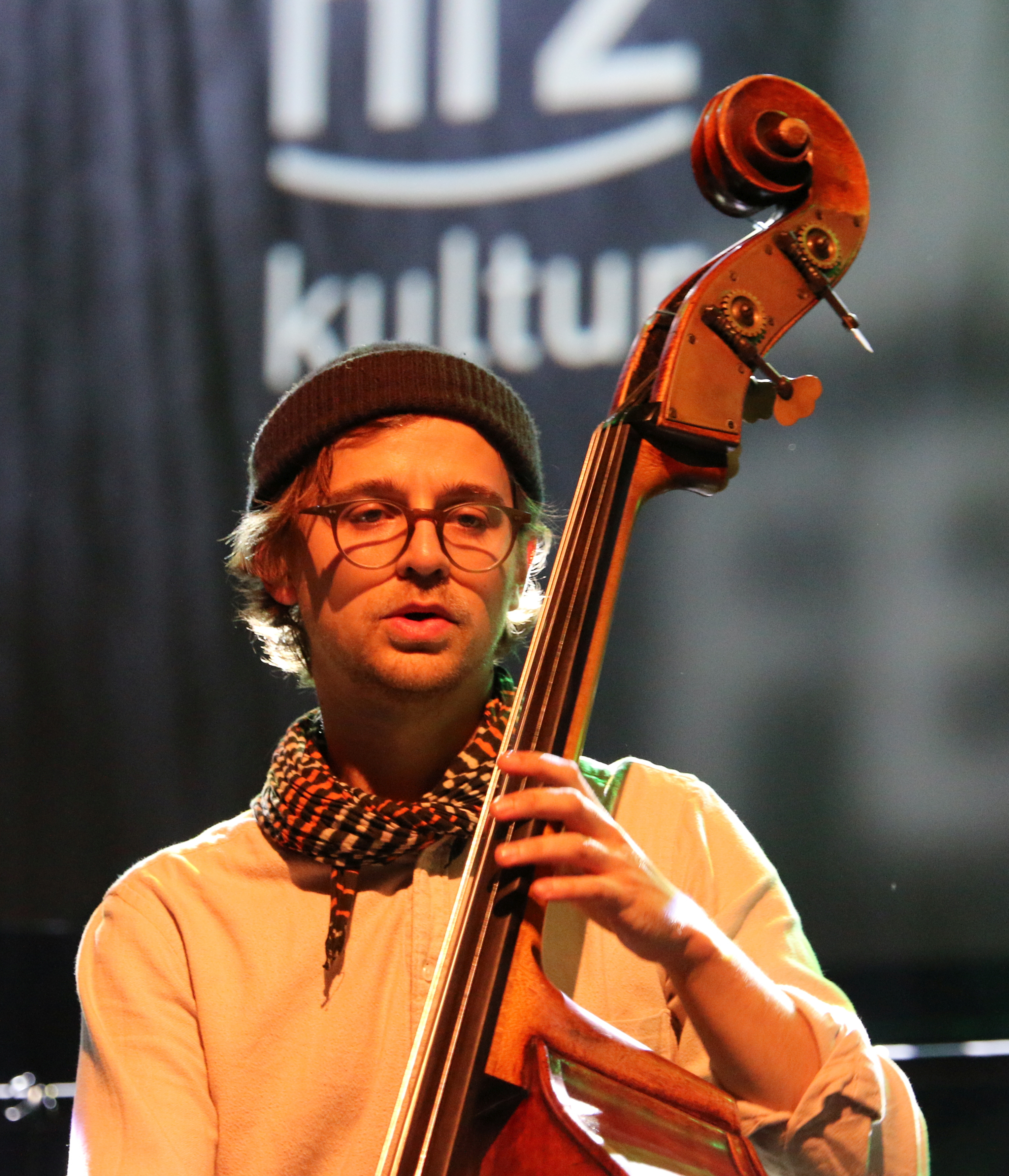 46. Deutsches Jazzfestival Frankfurt 2015: contrast trio +1: Tim Roth